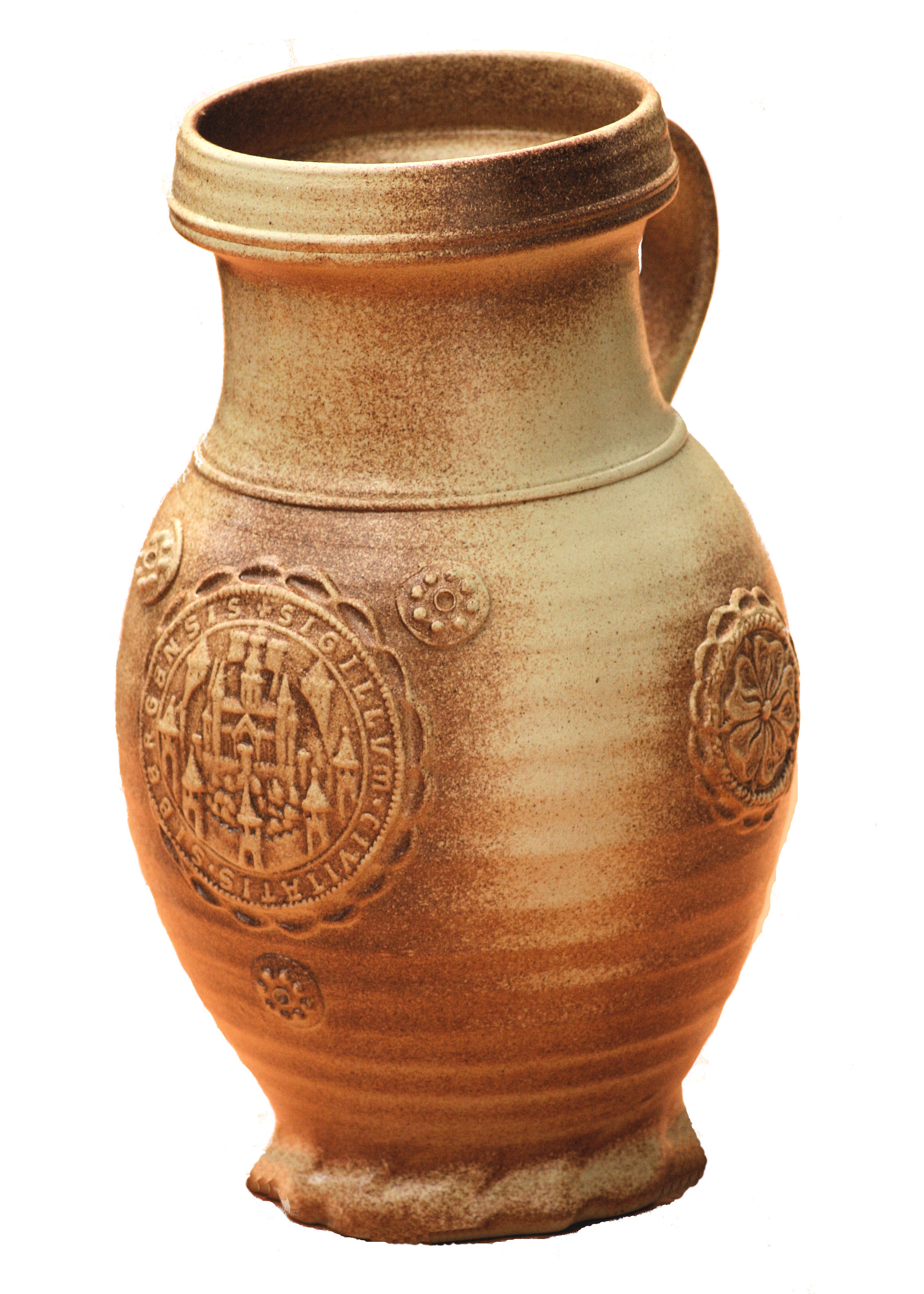 Siegburger Toepferware (Neuzeit)